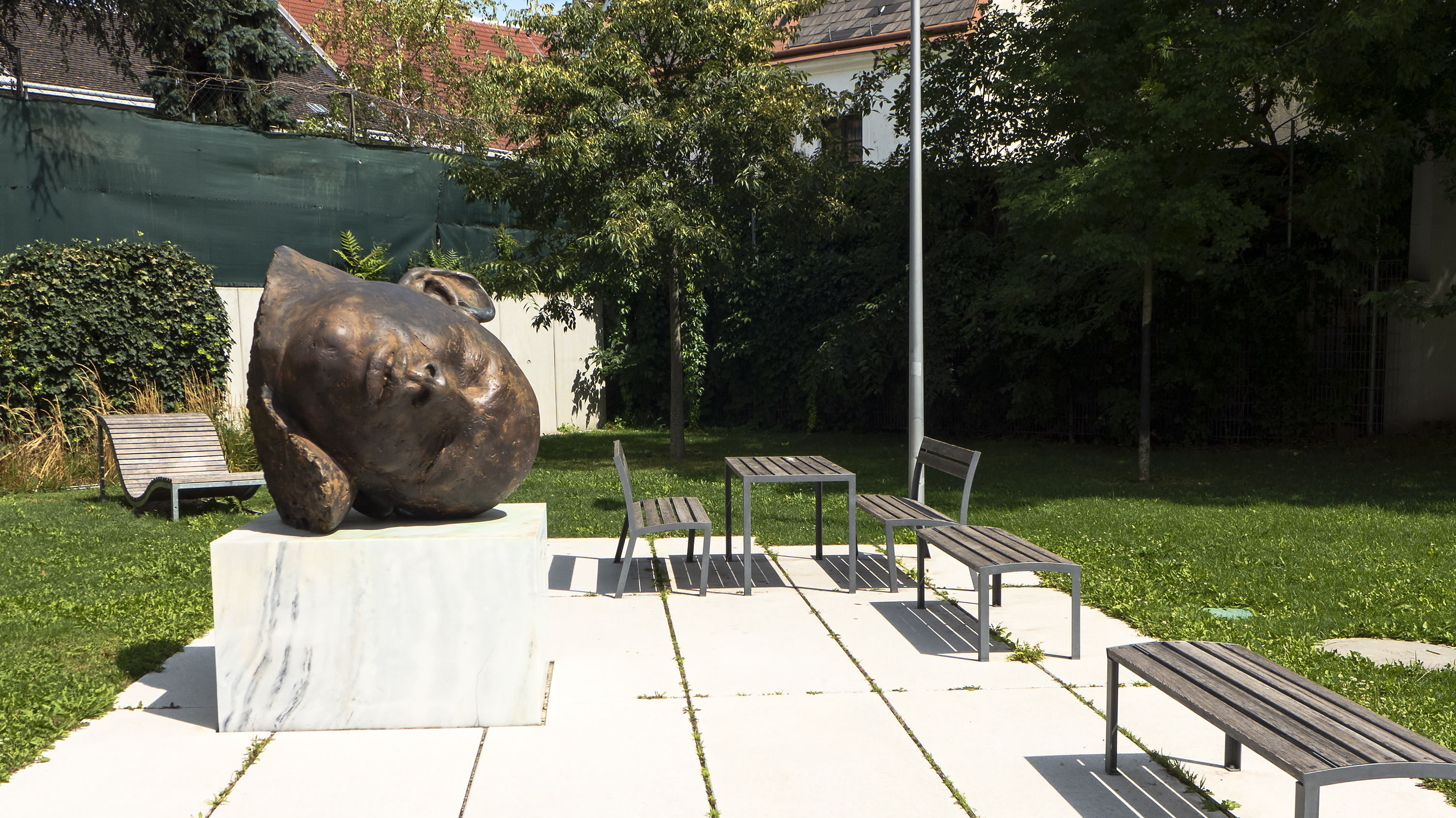 Friedrich-Gulda-Park in Wien 3